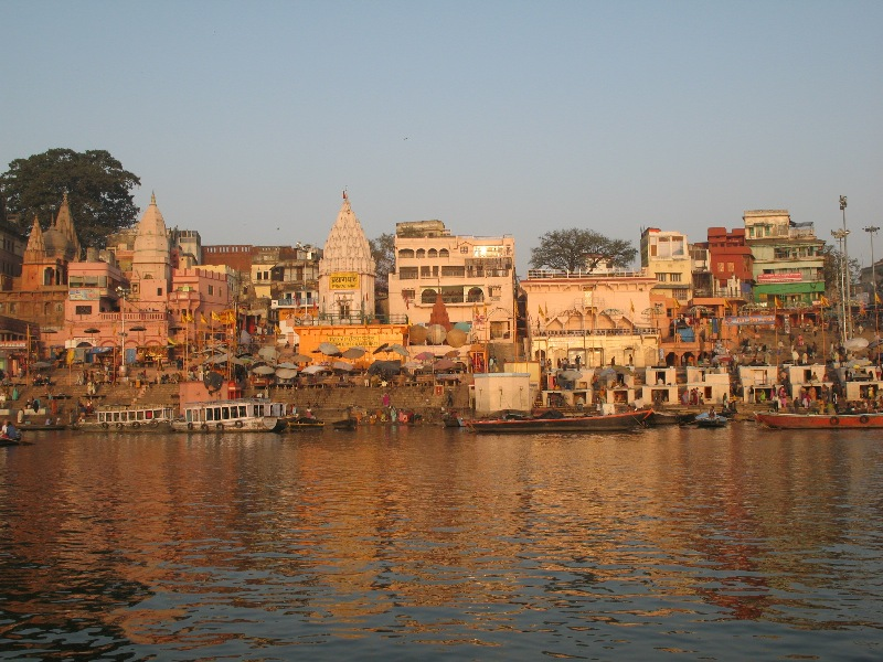 Varanasi